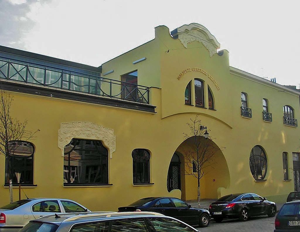 Miejskie Centrum Kultury w Bydgoszczy